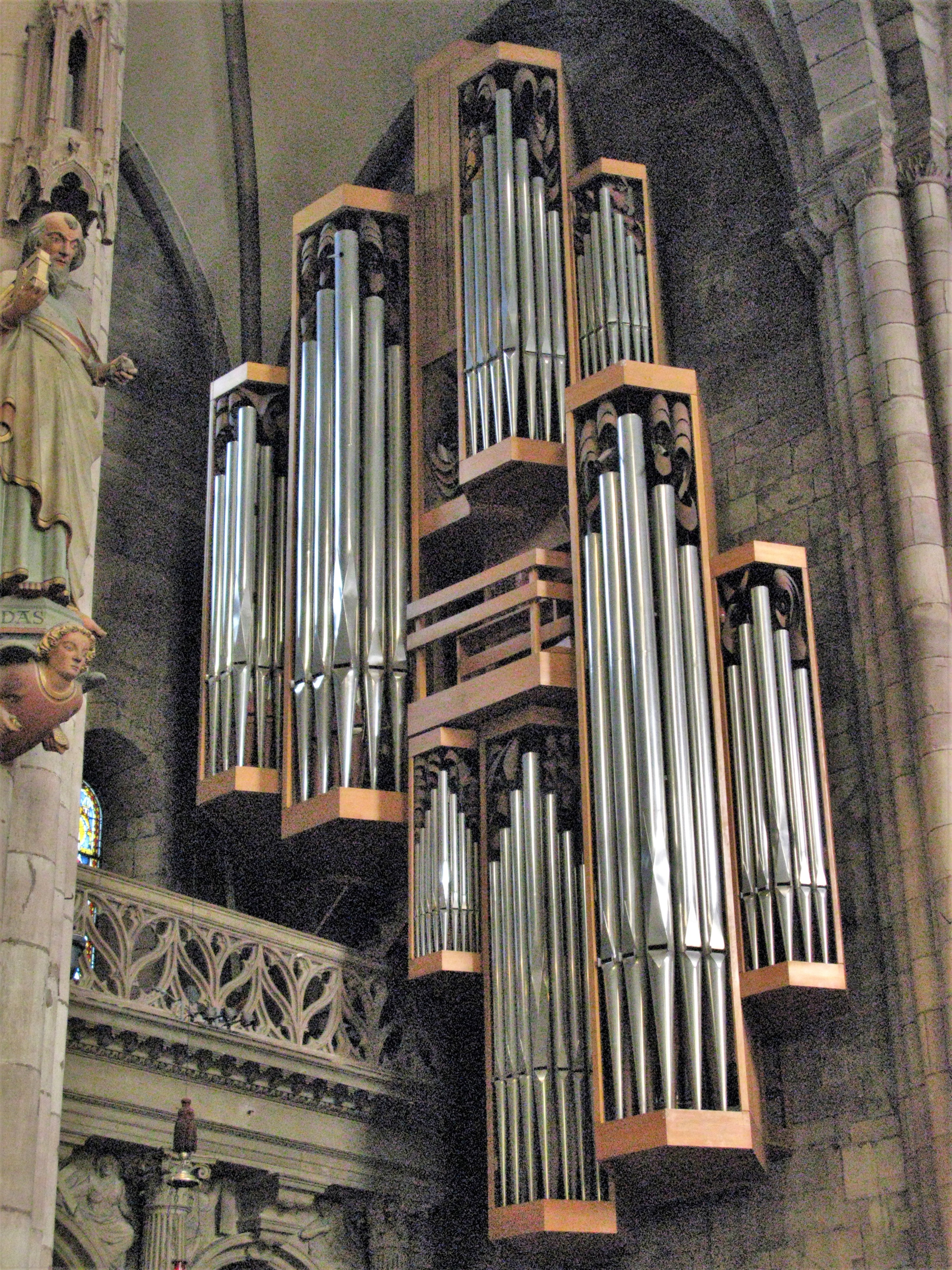 Freiburger Münster, Marienorgel